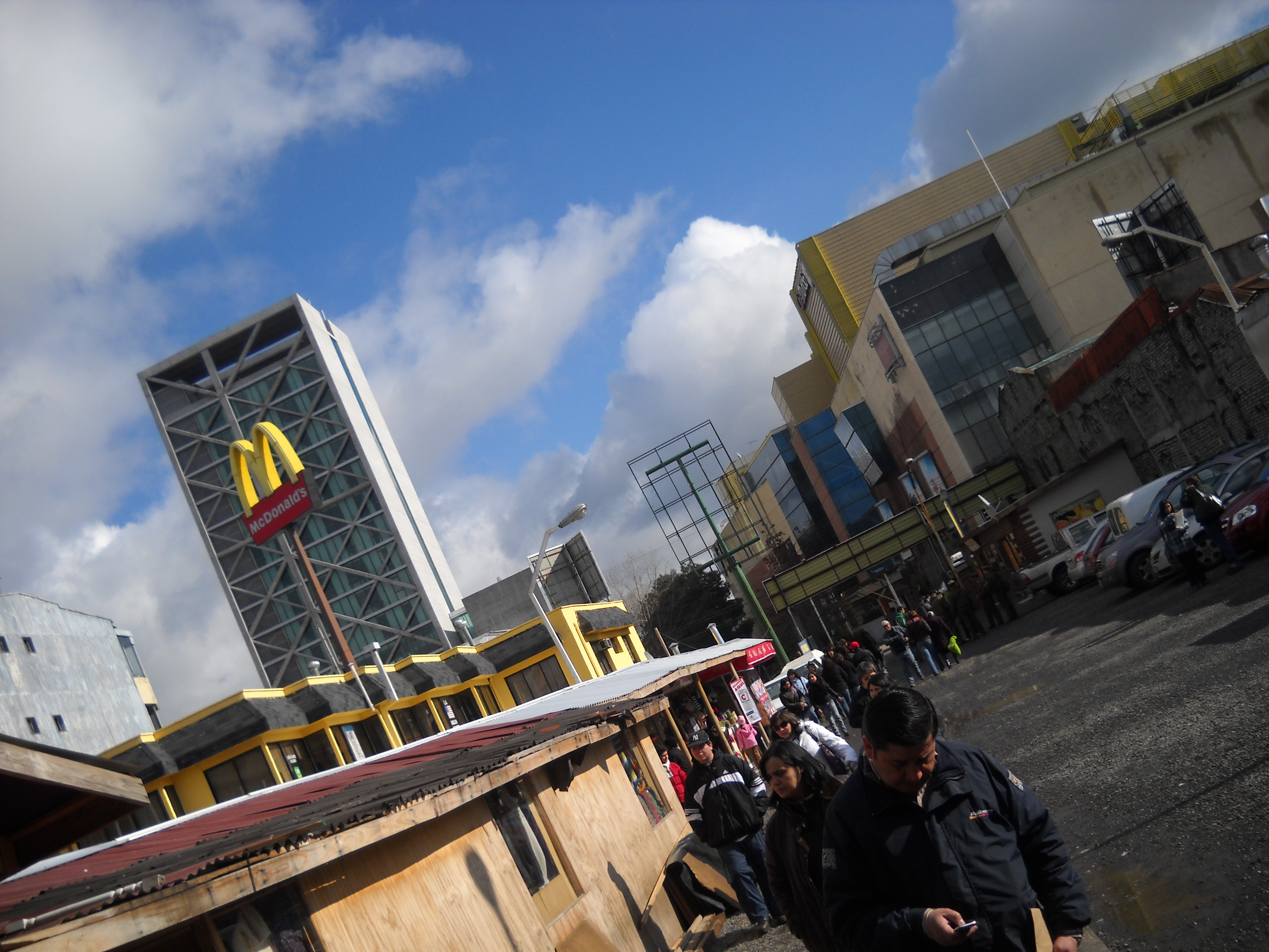 Centro de Los angeles visto desde la galeria Alcalá.